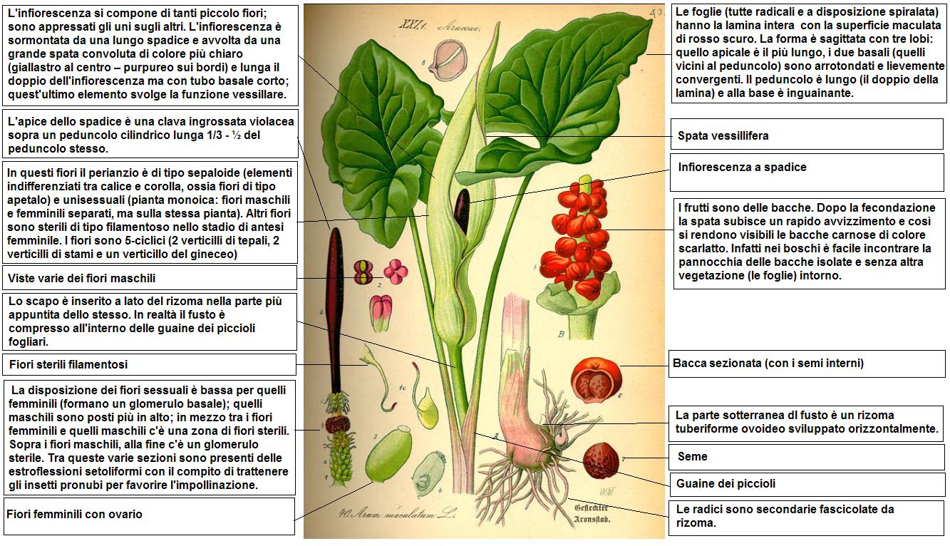 Arum maculatum Thome DESC01